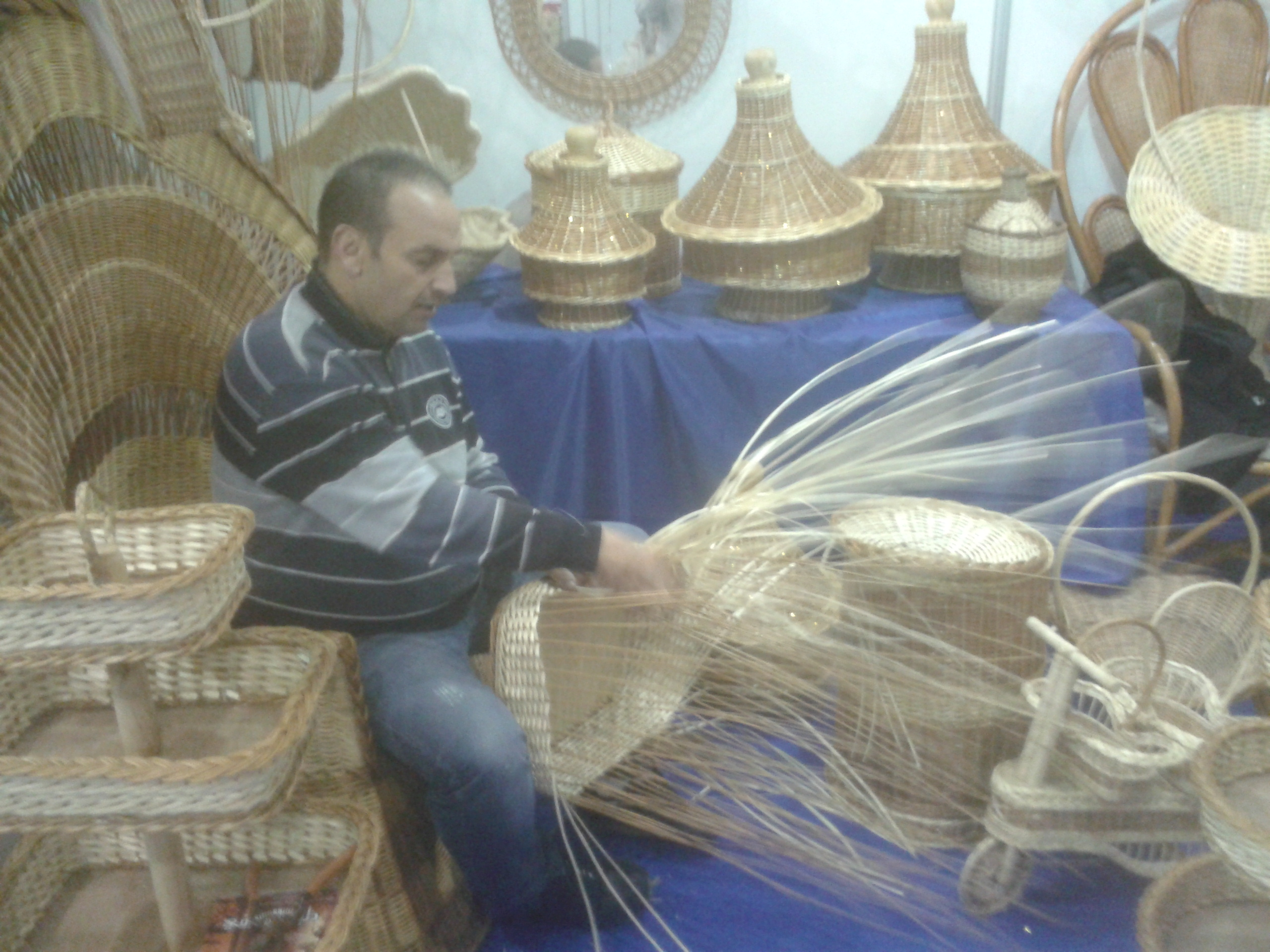 Salon national de l'artisanat 2014, Oran, Algérie